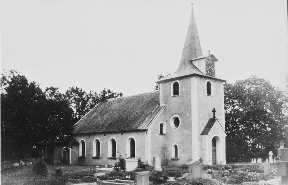 Kyrkan från nordväst.